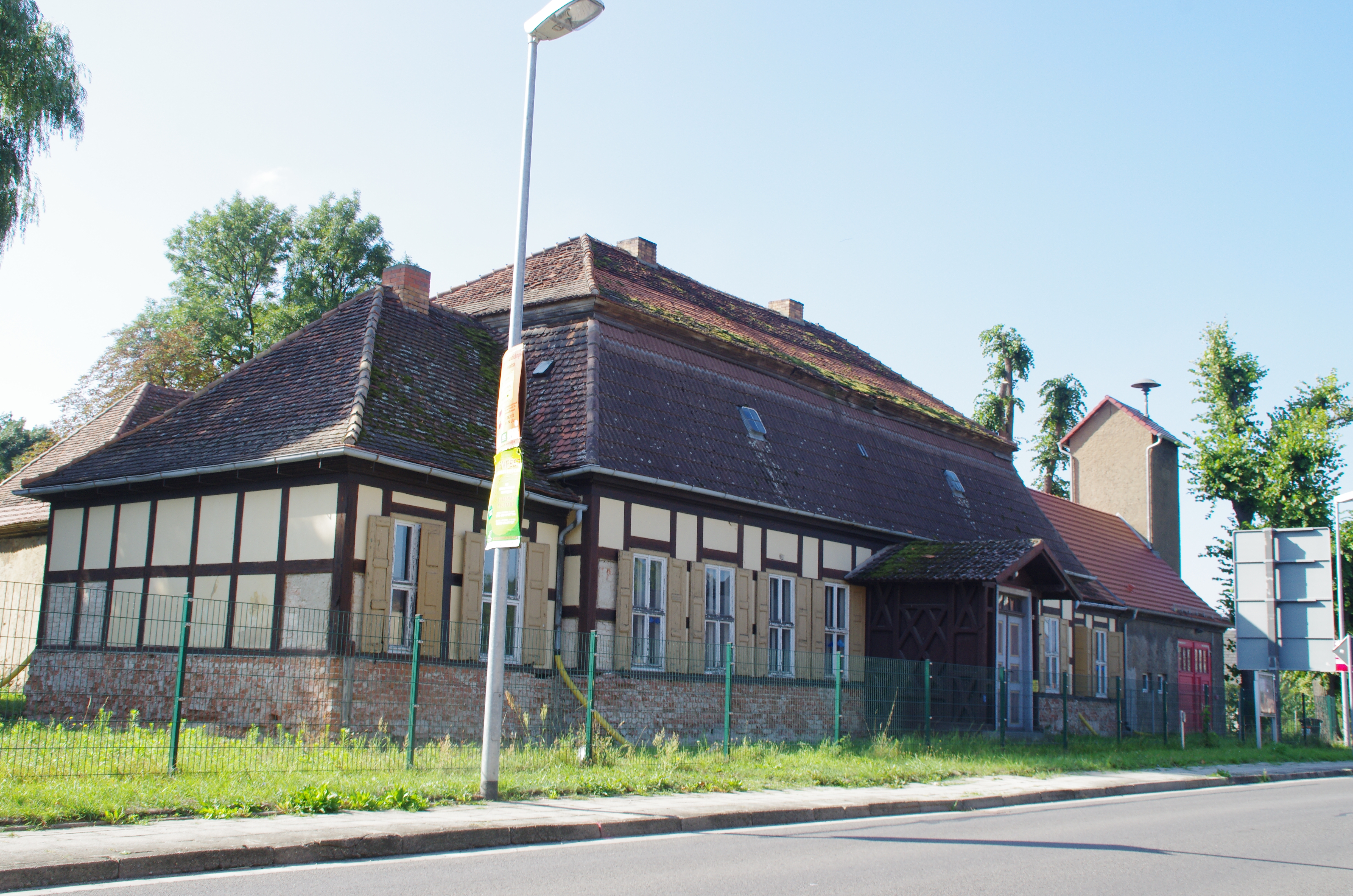 Lübbenau/Spreewald in Brandenburg. Das ehemalige Jagdhaus Groß Beuchow in der Beuchower Hauptstraße 18 steht unter Denkmalschutz.